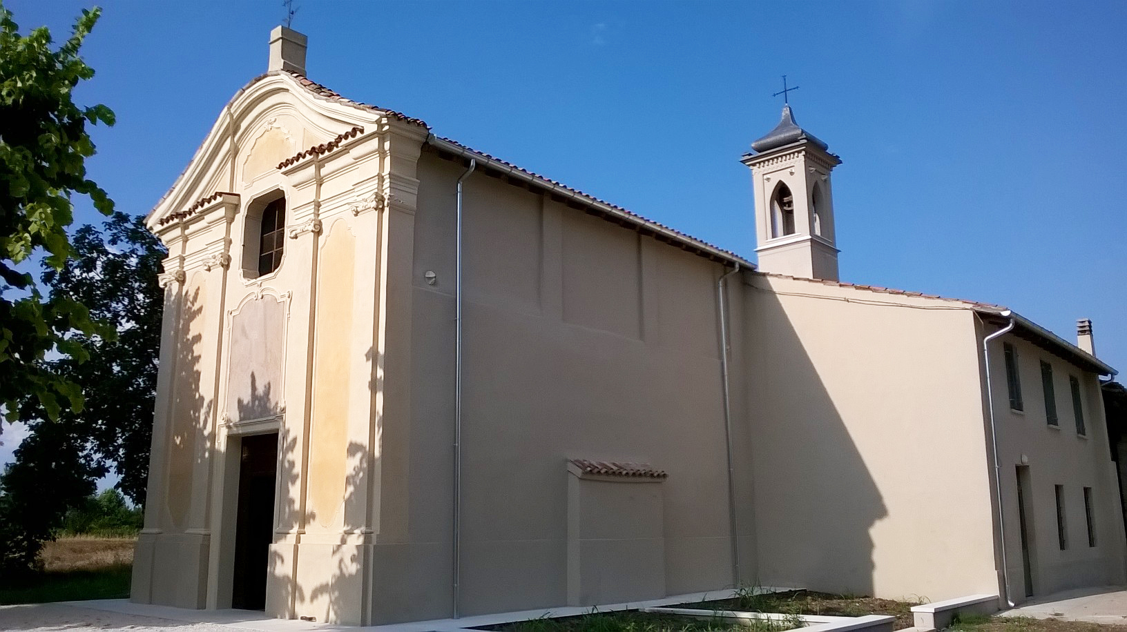 Ceresara, santuario di Santa Maria della Possenta dopo il restauro a seguito terremoto 2012.